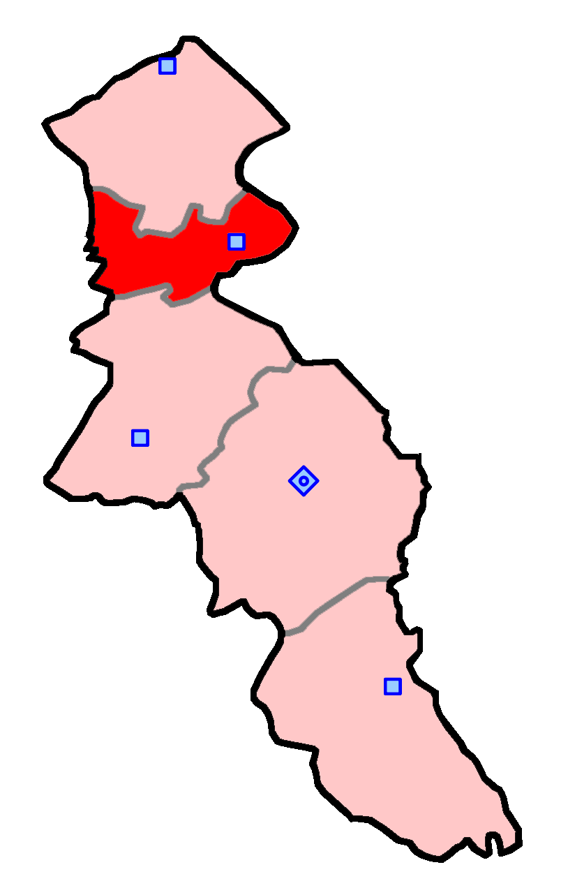 حوزهٔ انتخاباتی گرمی برای انتخابات مجلس شورای اسلامی